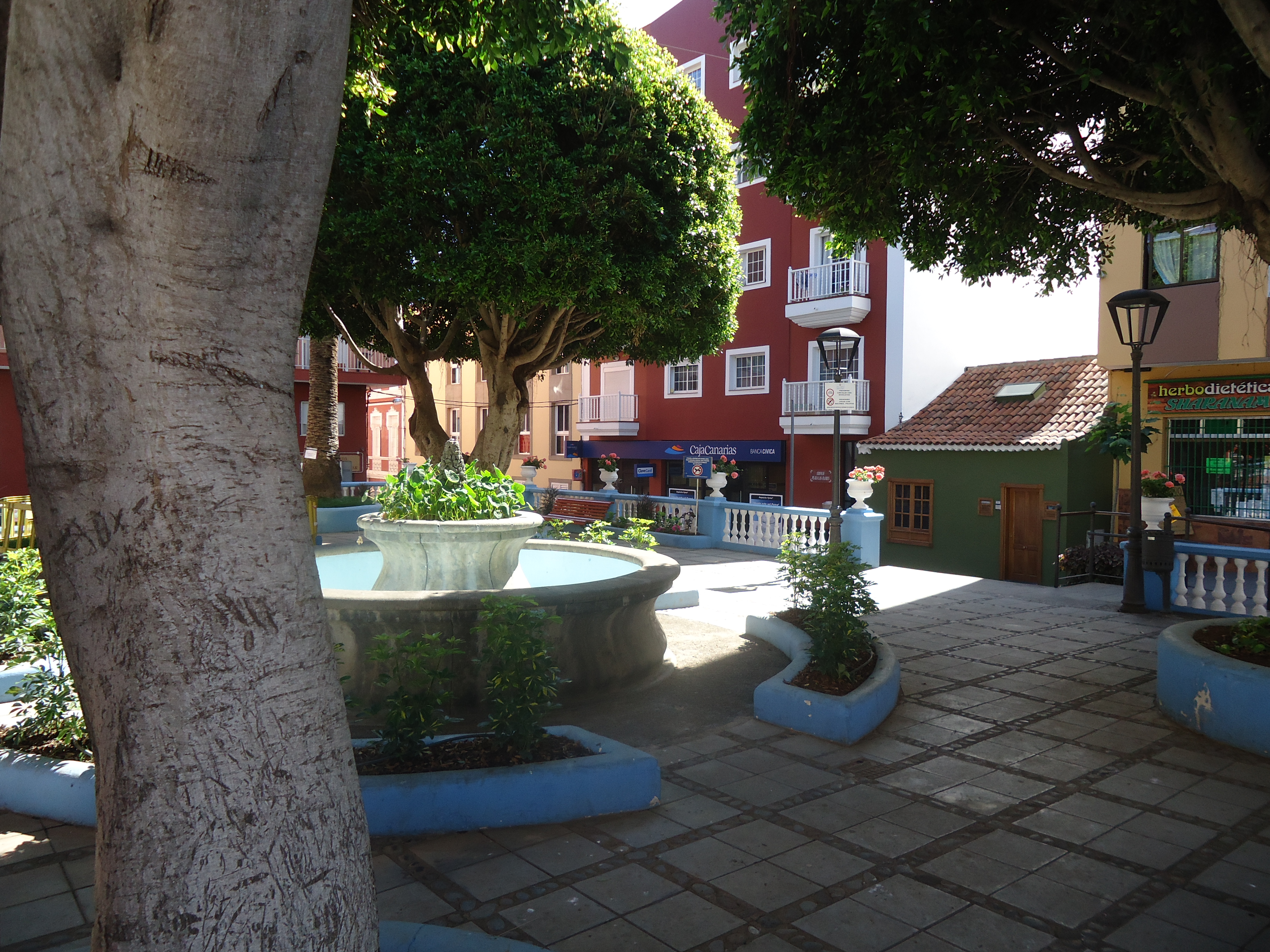 Plaza García Estrada, apodada Plaza de Las Flores, Los Realejos